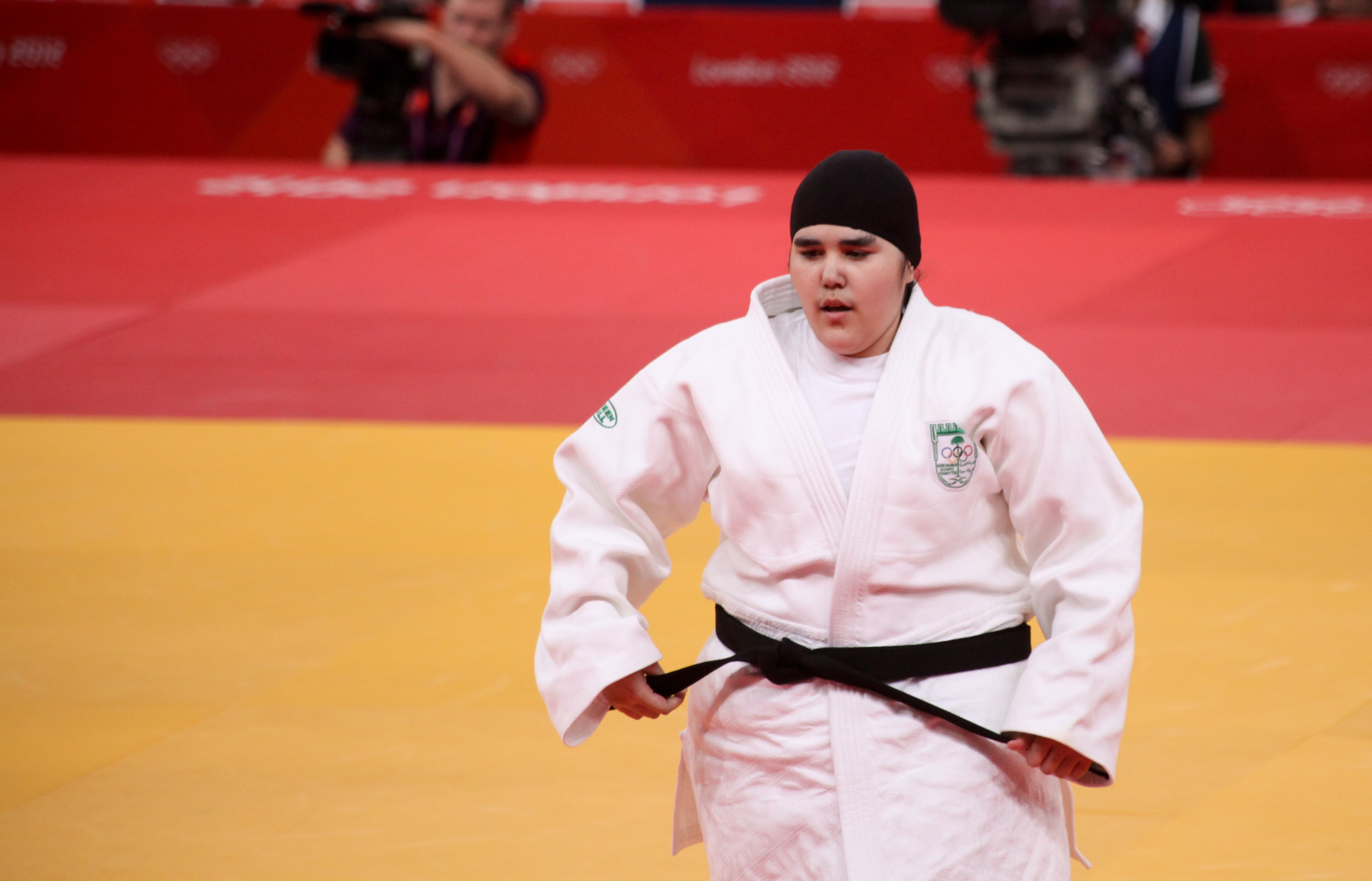 Saudi Arabian judoka, Wojdan Shaherkani at the 2012 London Olympics